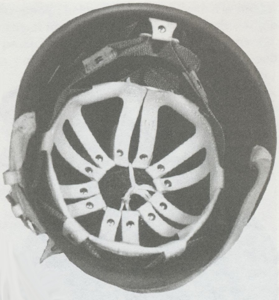 Hełm wz. 67/75 - fasunek